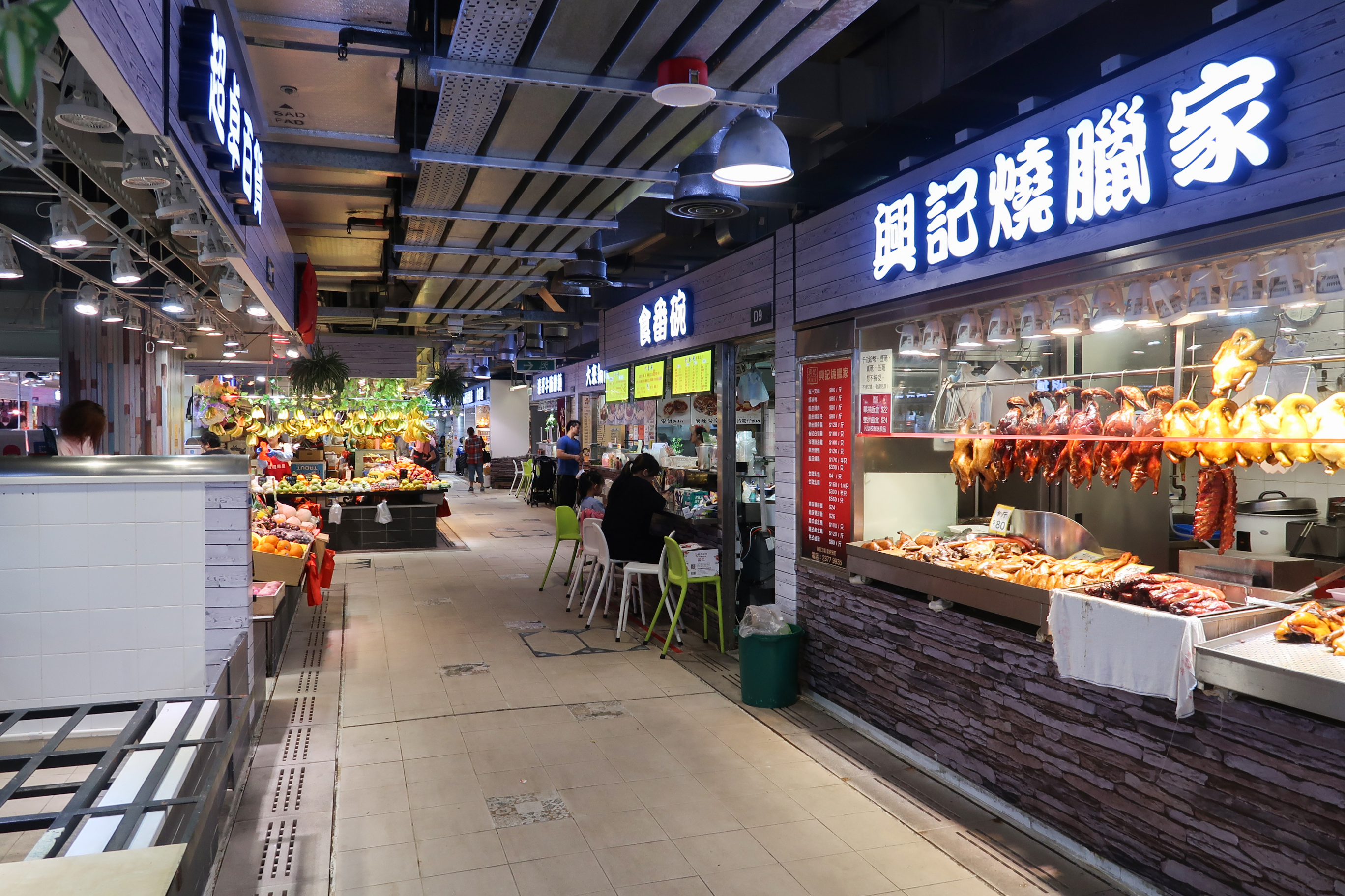 Yan Tin Farm Market